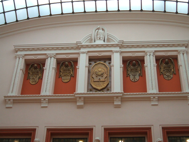 Stralsund,_Germany,_Wertheim-Kaufhaus,_Detail_(2006-09-29)